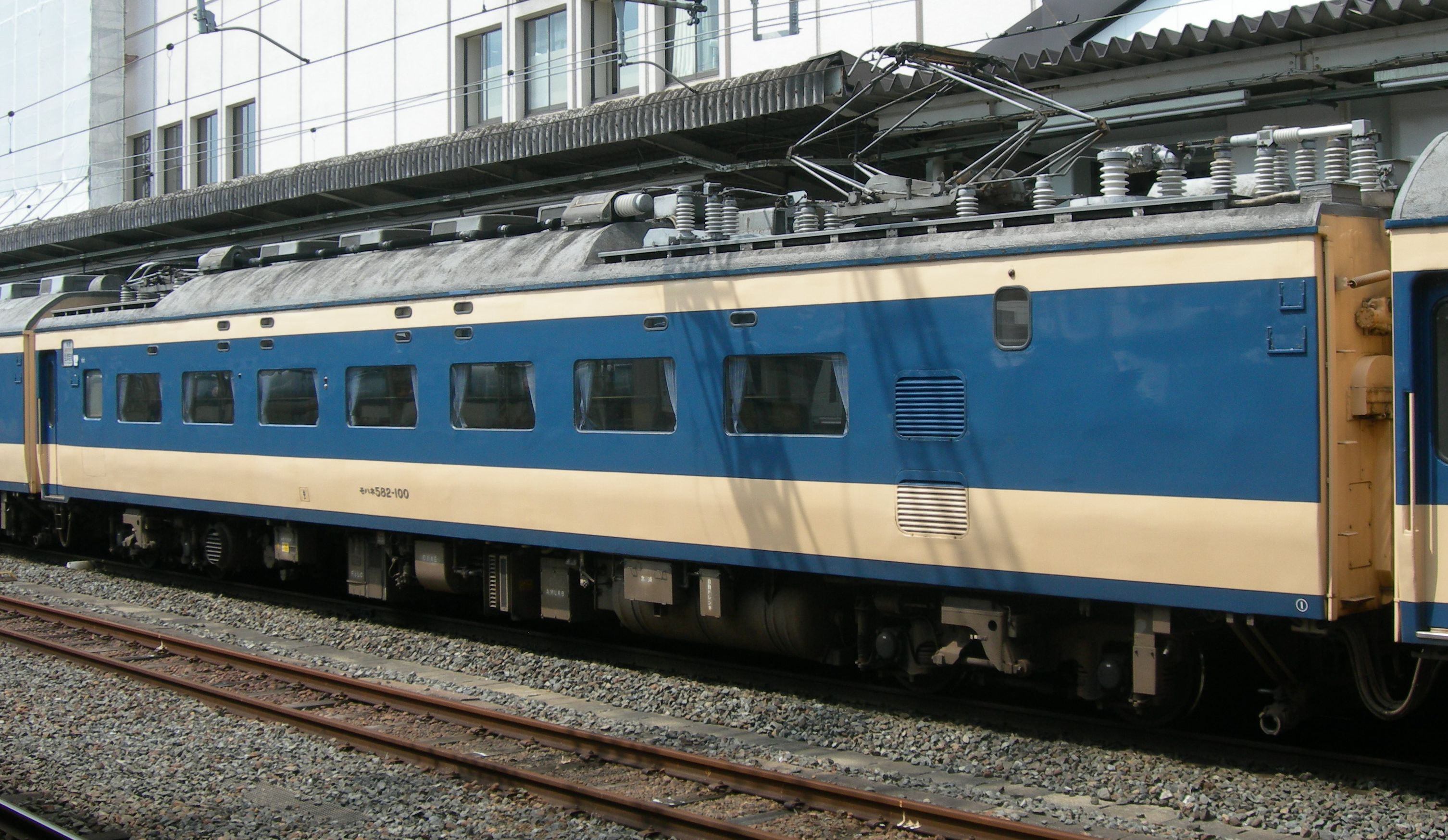 583系電車 モハネ582-100